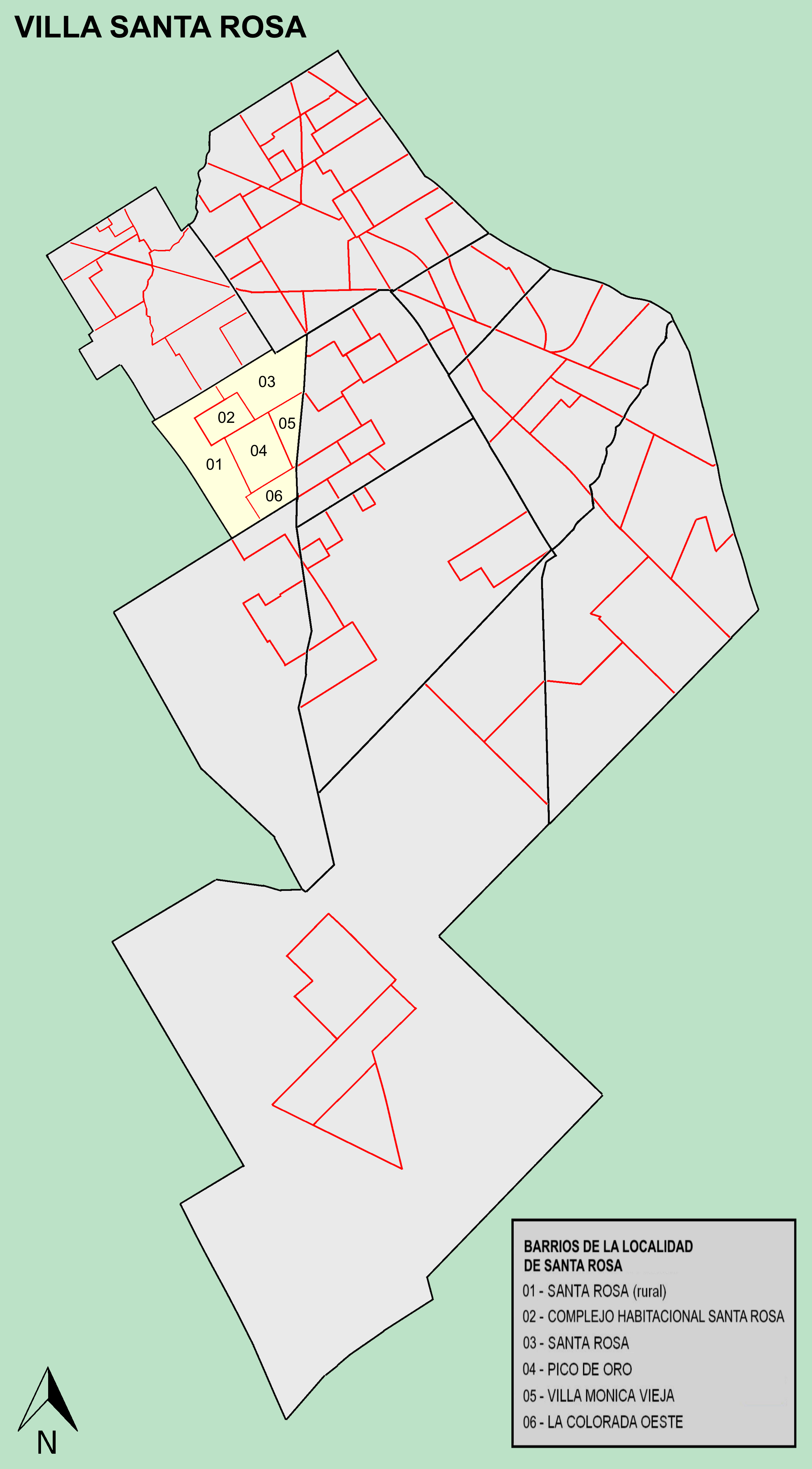 Mapa barrios de Villa Santa Rosa